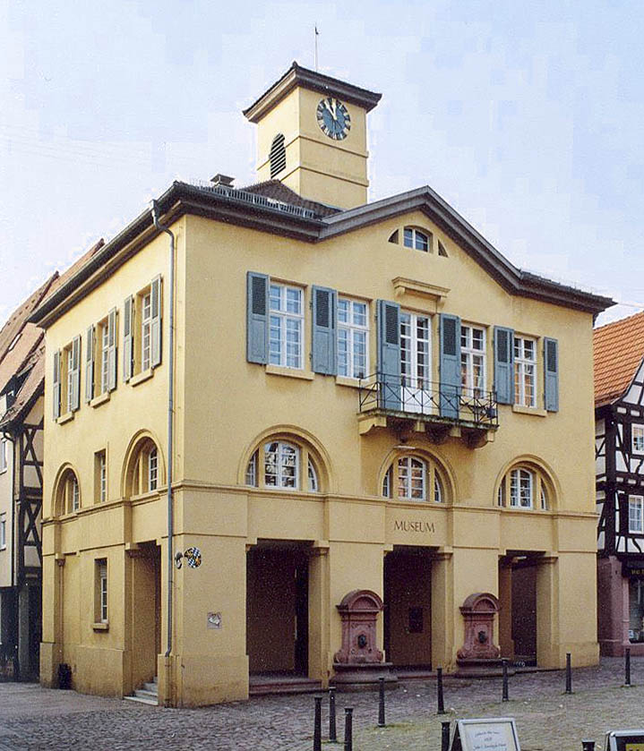 Das Eberbacher Rathaus im Weinbrenner-Stil, erbaut 1824 nach Entwurf von Johann Thierry. Monumental, wuchtig, geradezu bullig - eines der gelungensten Rathäuser des Klassizismus in Baden.